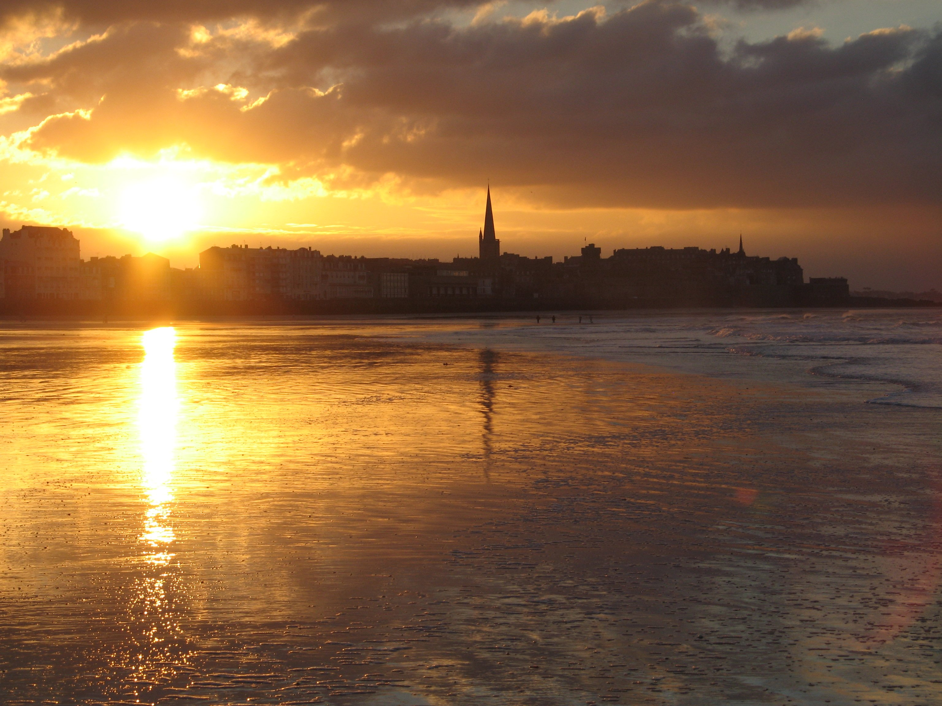 Sonnenuntergang über der Altstadt (ville close) von Saint-Malo. Blick von Osten, vom Strand plage du sillon